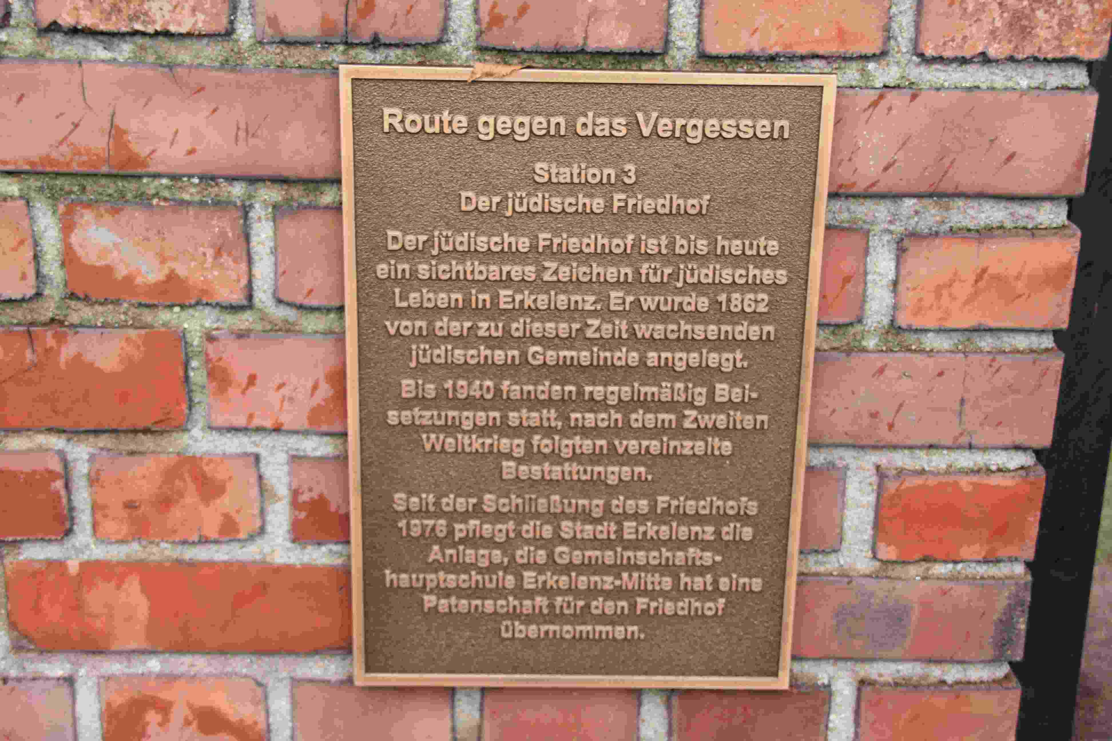 Jüdischer Friedhof Erkelenz 01